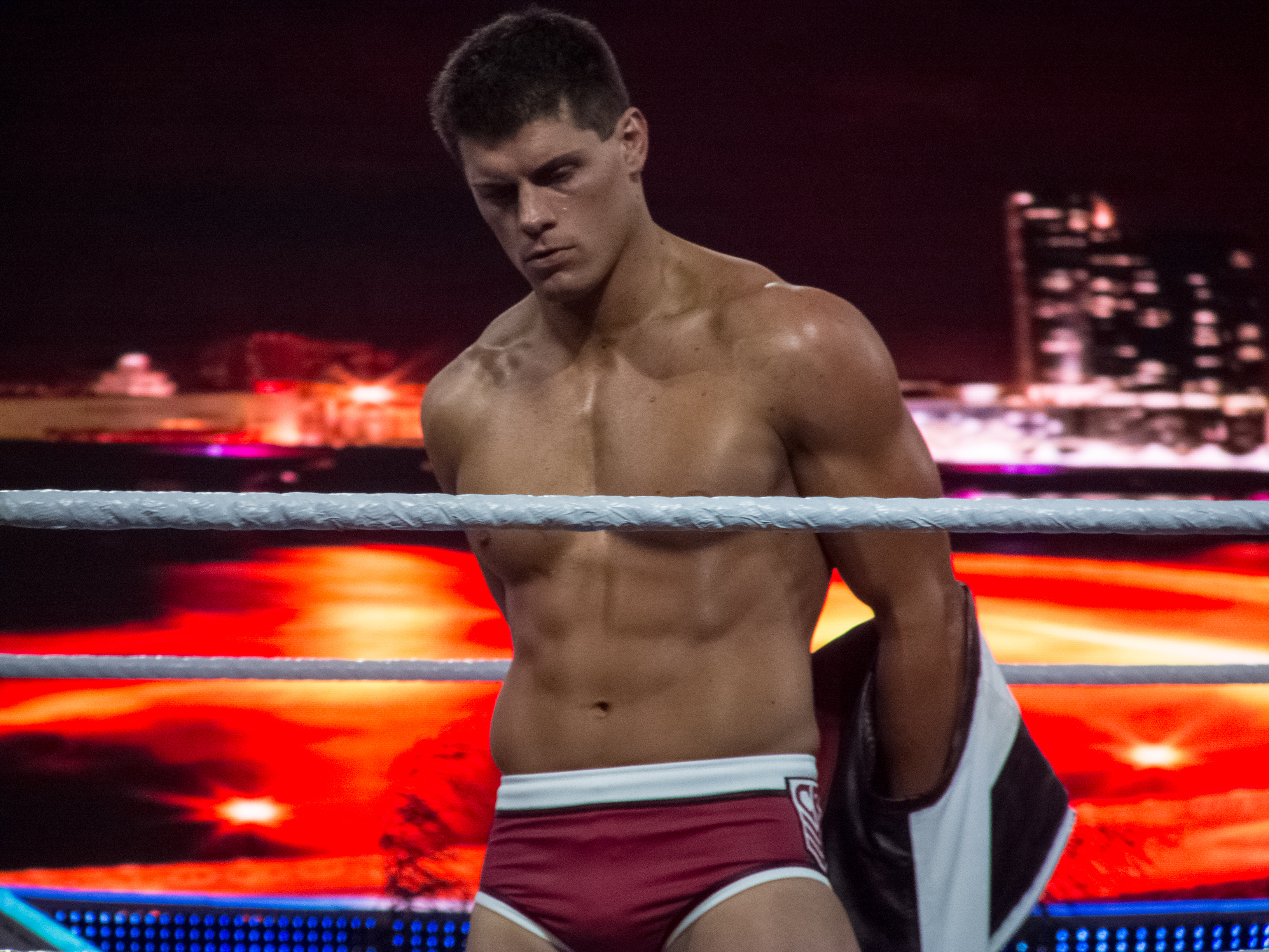 Коди Роудс на Рестлмании XXVIII